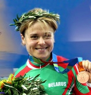 Natallia Tsylinskaya